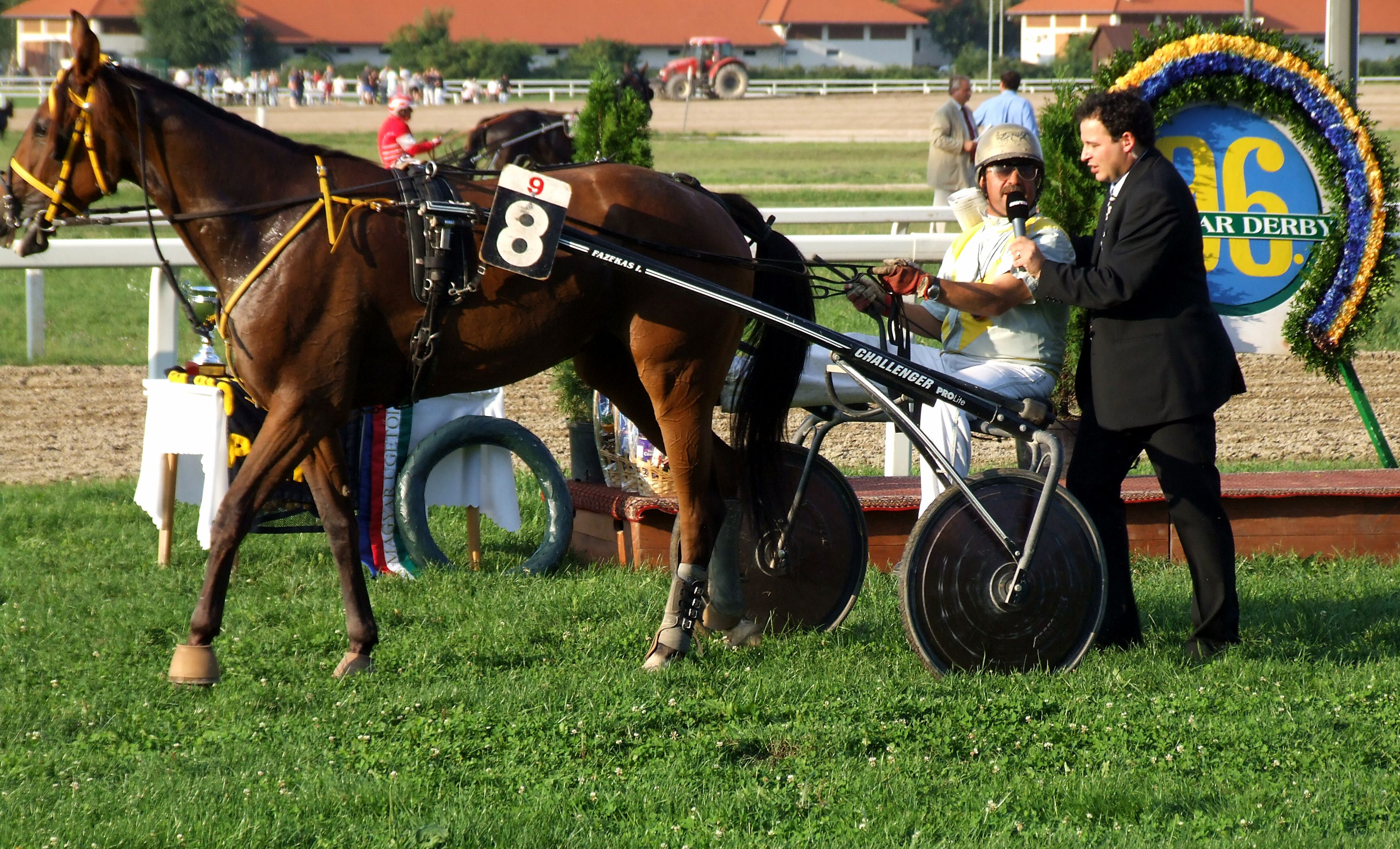 Magyar Ügetőderby 2010. A győztes hajtó Fazekas Imre első interjúja, a kérdező Krebs András. Kincsem Park.